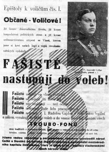 Volební leták Národní obce fašistické z roku 1935